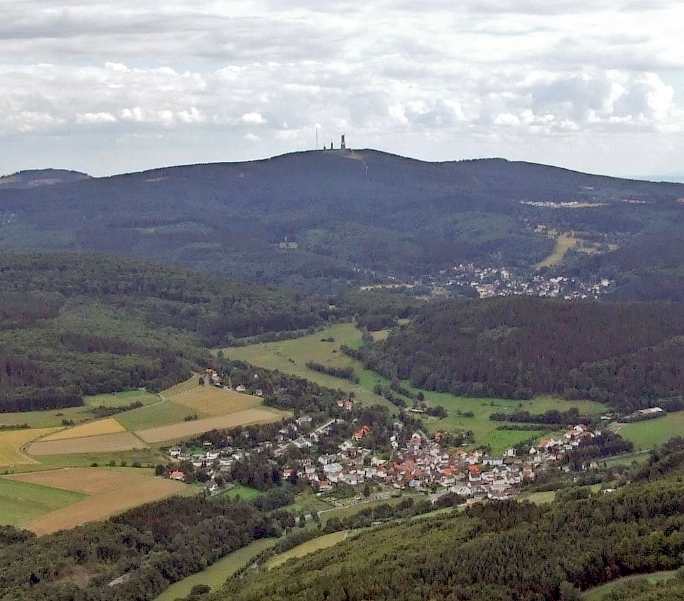 Hochtaunus mit Feldberggipfel, Luftaufnahme vom Hintertaunus (Ausschnitt) - Editiert von User:Zualio: Versucht, Blaustich zu mindern